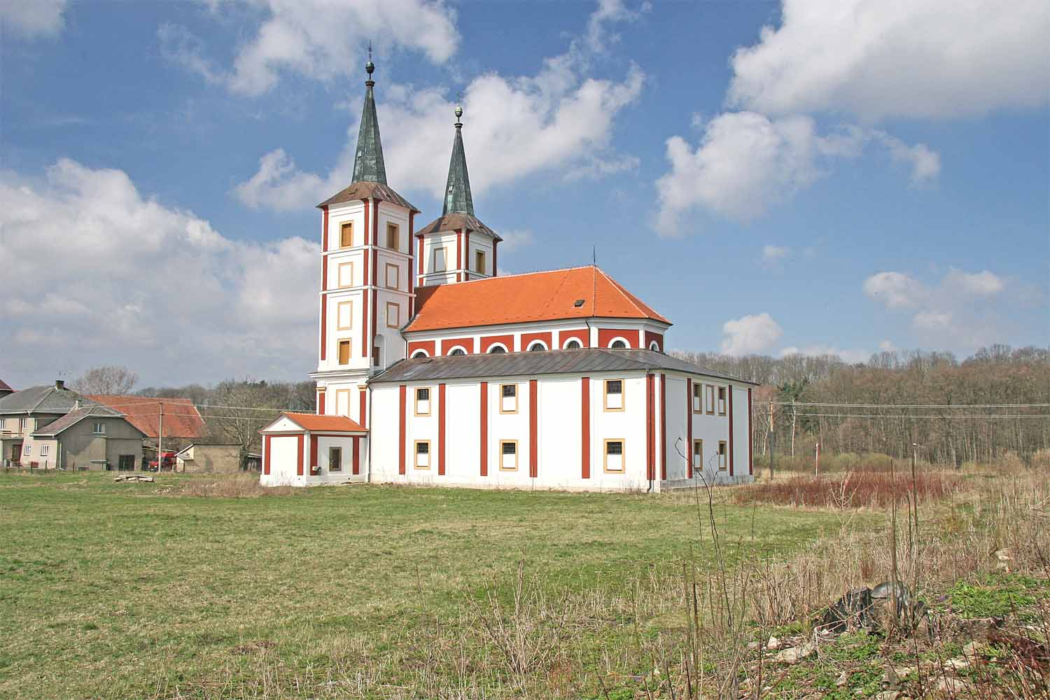 Barokní kostel Sv. Markéty v místech bývalého Podlažického kláštera